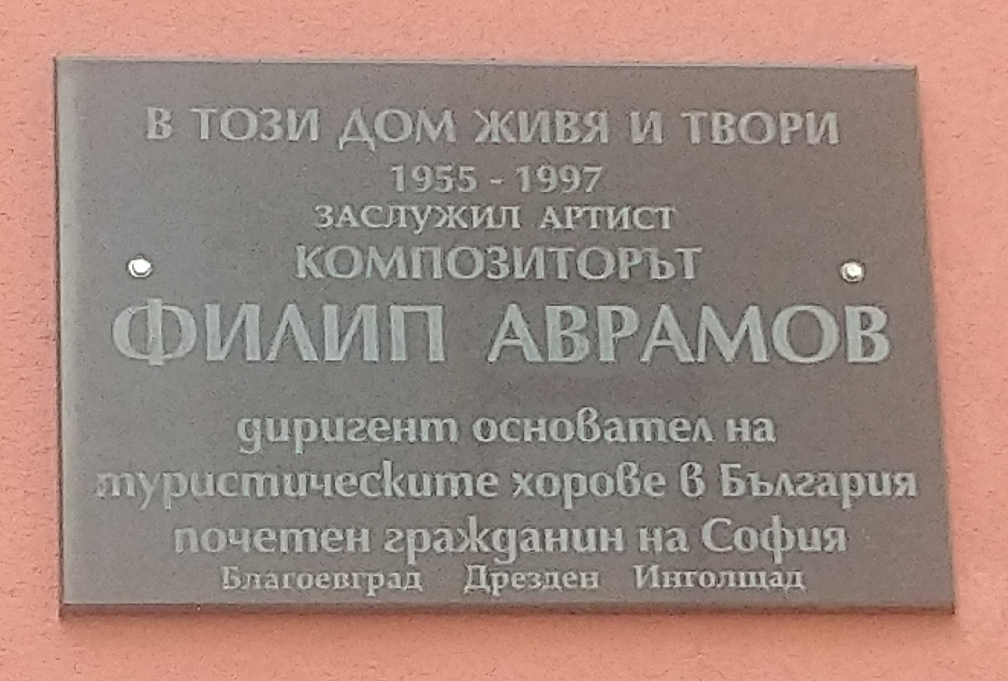 Паметна плоча на композитора и диригент Филип Аврамов, Ссофия, ул. "Софроний Врачански" 42